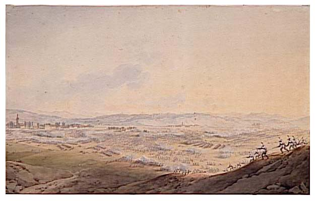 La bataille d'Eckmühl le 22 avril 1809 à 6 heures du soir